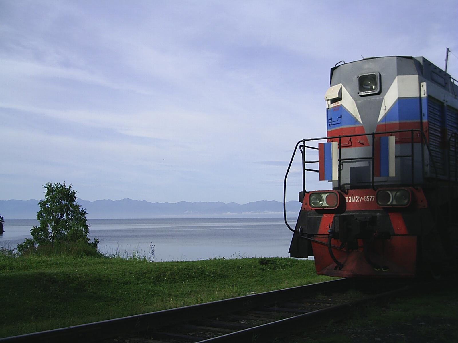 КБЖД. Половинный. 2006 г.